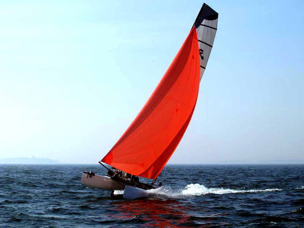 Hobie Cat Tiger, purjehduskilpailu, Suomen Urheiluveneliitto, Helsinki